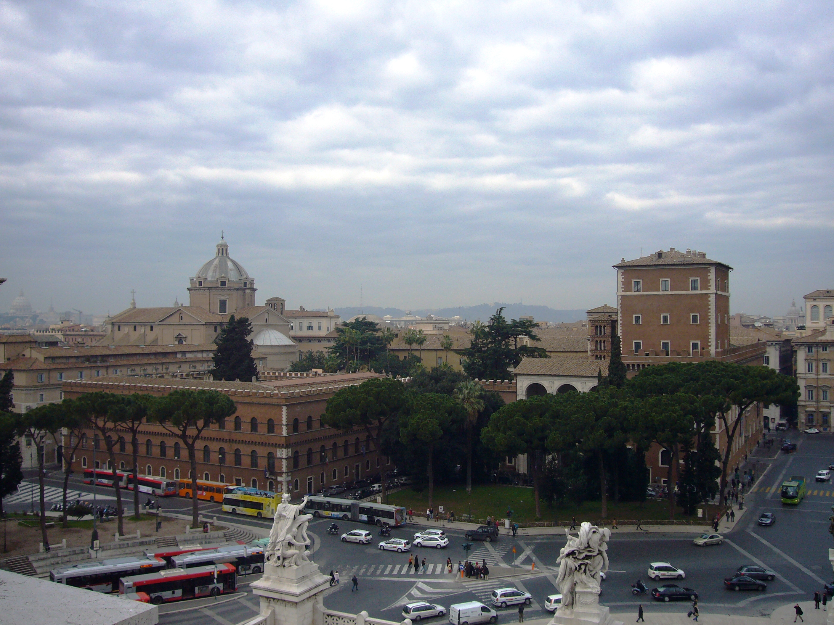 Roma, Palazzo Venezia. Vista d'insieme dal Vittoriano. Sullo sfondo, da sinistra: la cupola di San Pietro, la chiesa del Gesù, Monte Mario. Dietro il giardinetto di pini, la basilica di San Marco